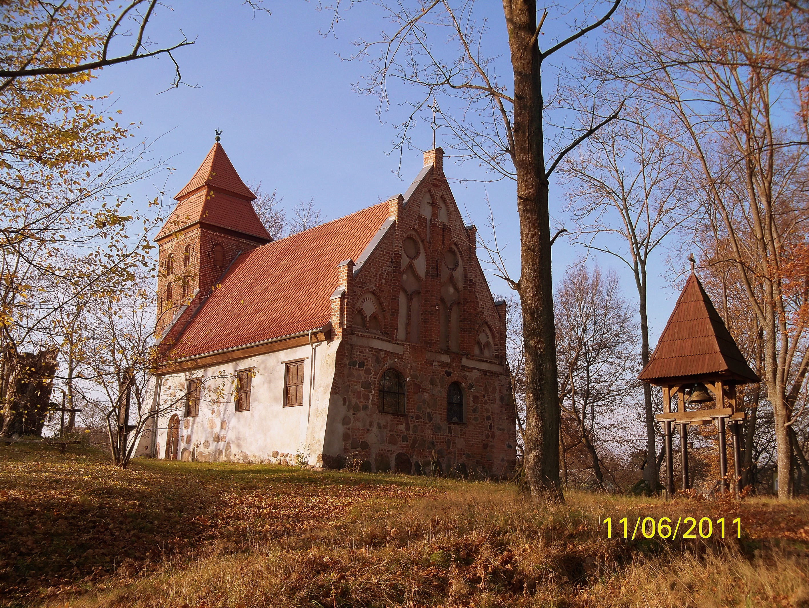 Kościernica, kościół p.w. MB Królowej Polski (zabytek nr rejestr. 25)